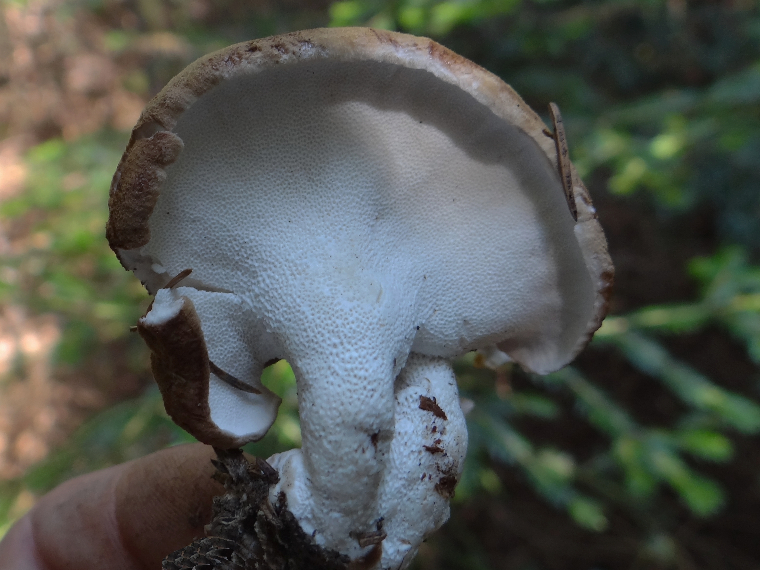 Albatrellus cristatus (location: Poland, Beskid Wyspowy, Kobylica (inaczej Kiczora))